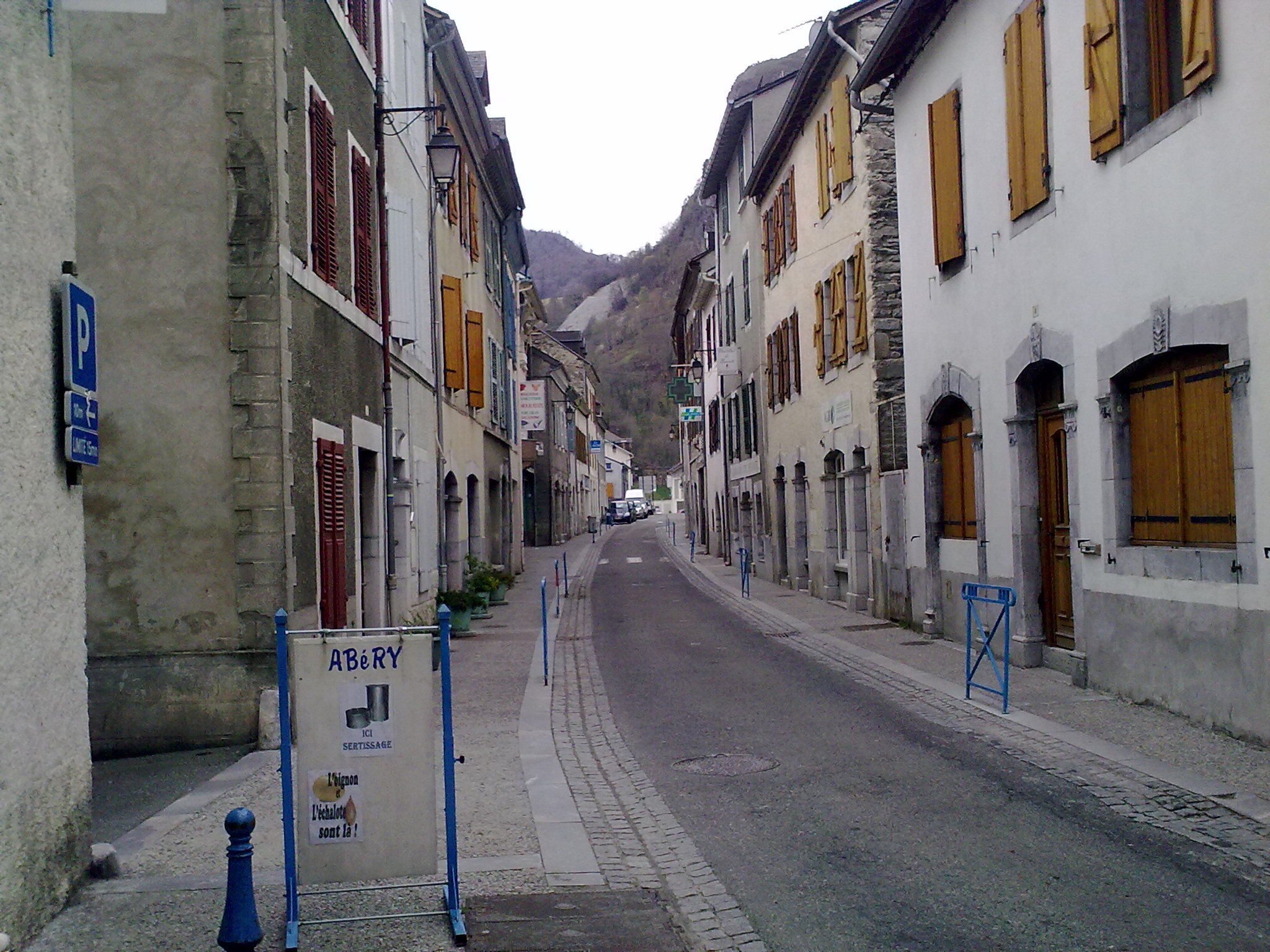 Laruns